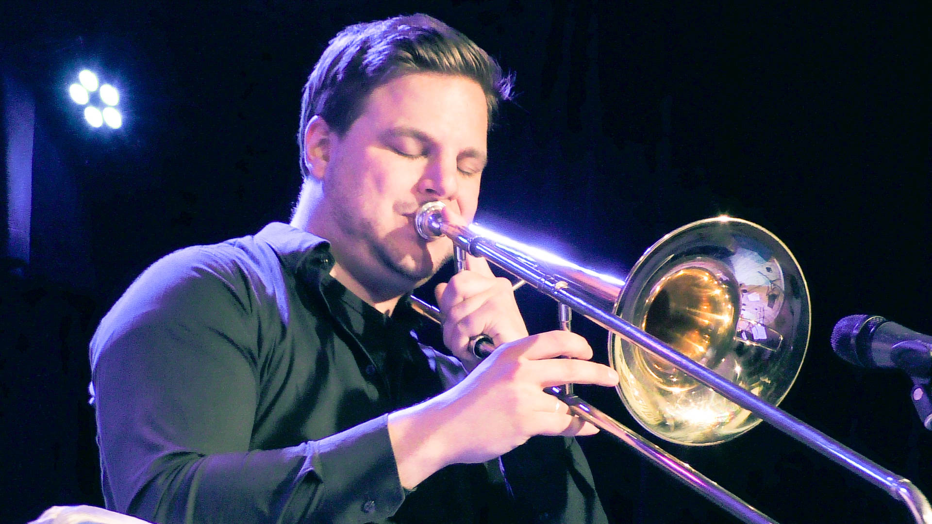 12.03.2017. Еврейский культурный центр на Никитской.